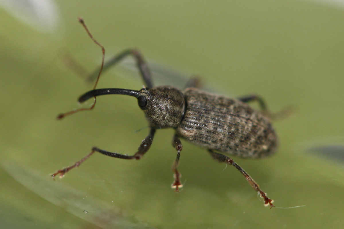 Langarmiger Spießrüssler (Dorytomus longimanus), Männchen, 26.2.2017, nahe Mannheim